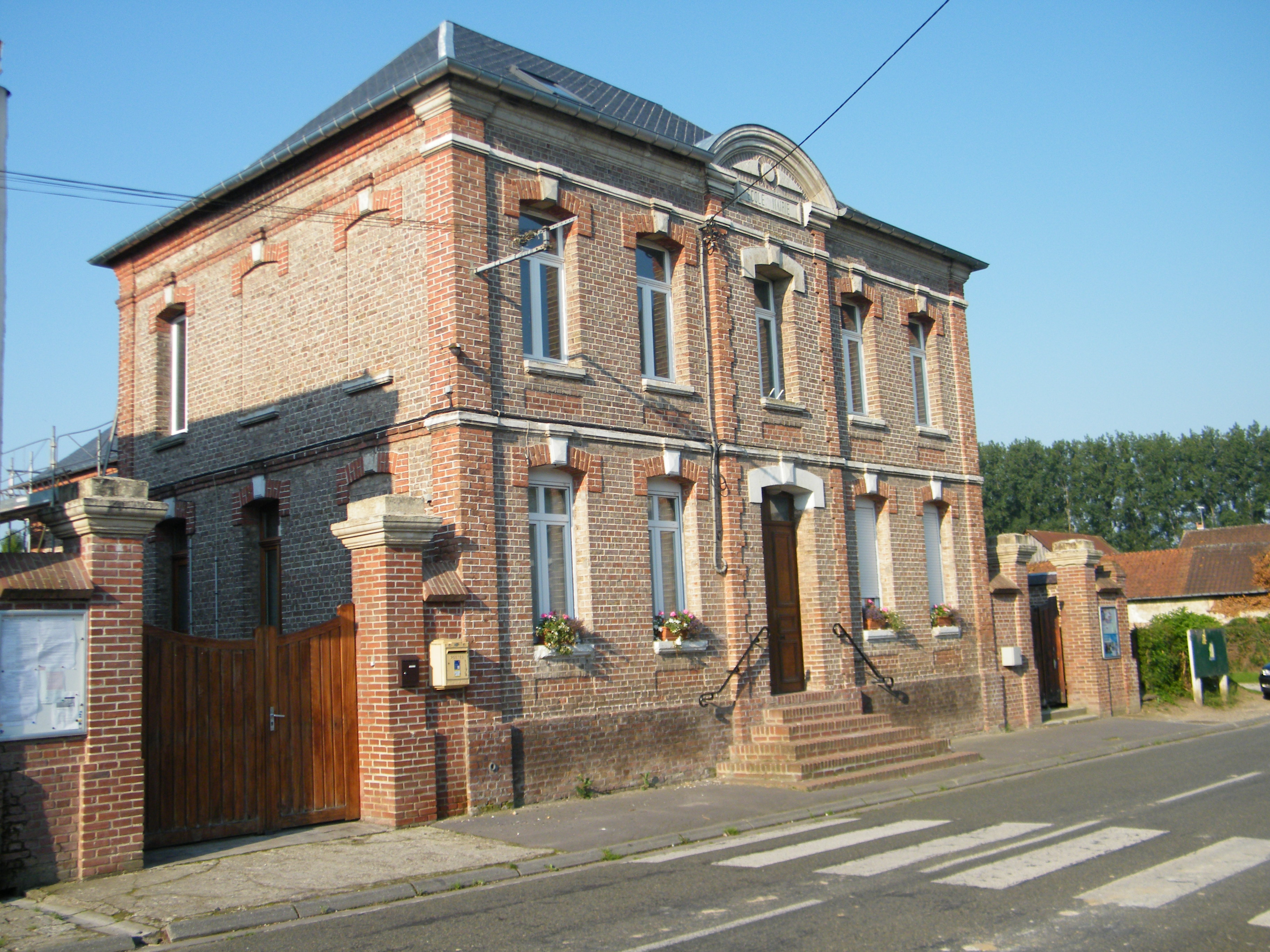 Mairie-école.